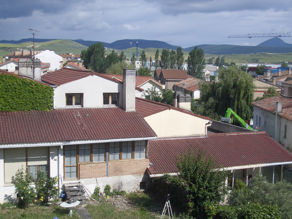 Aranguren haraneko Mutiloa kontzejua.